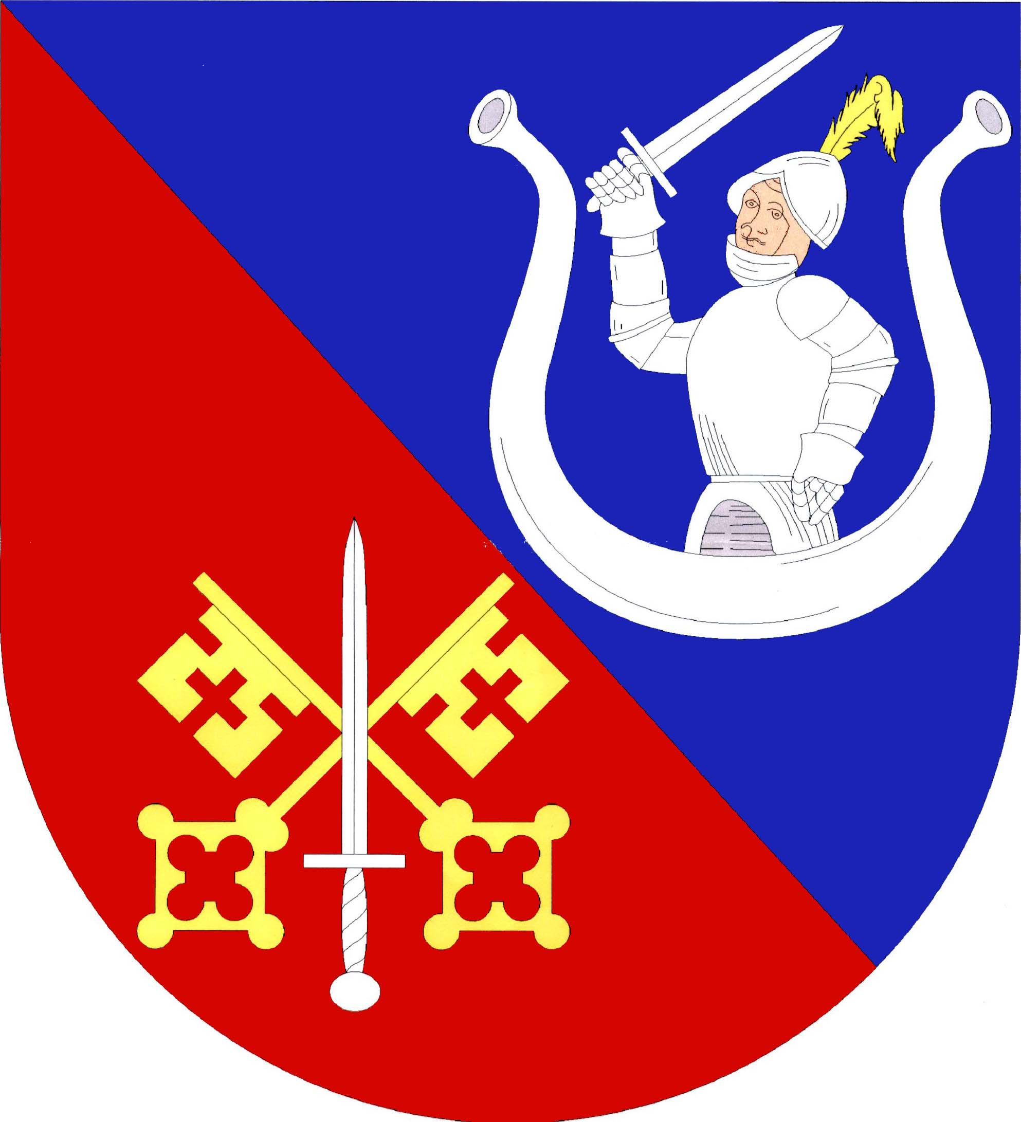 Znak obce Batelov